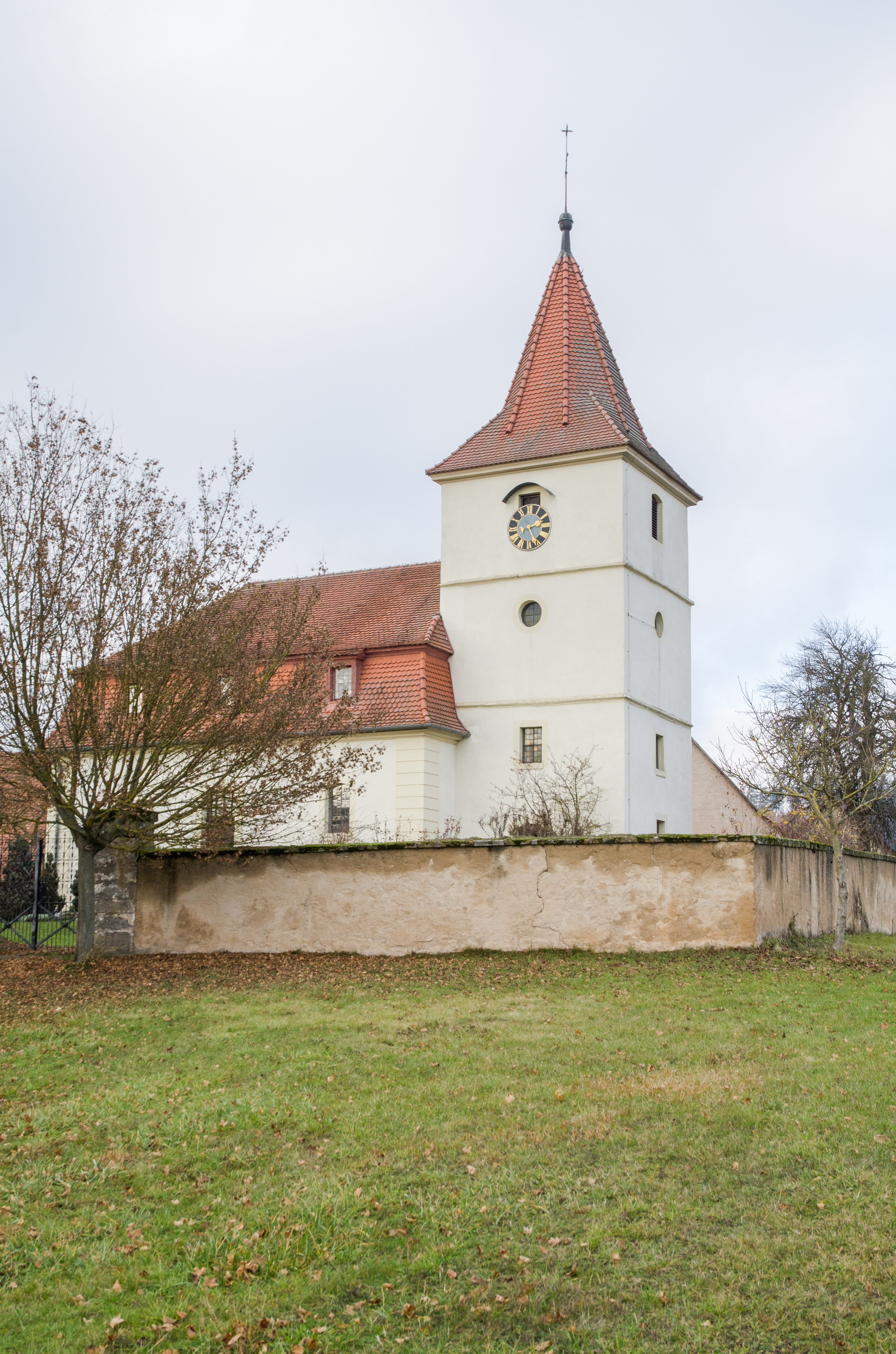 Häslabronn, St. Jacob